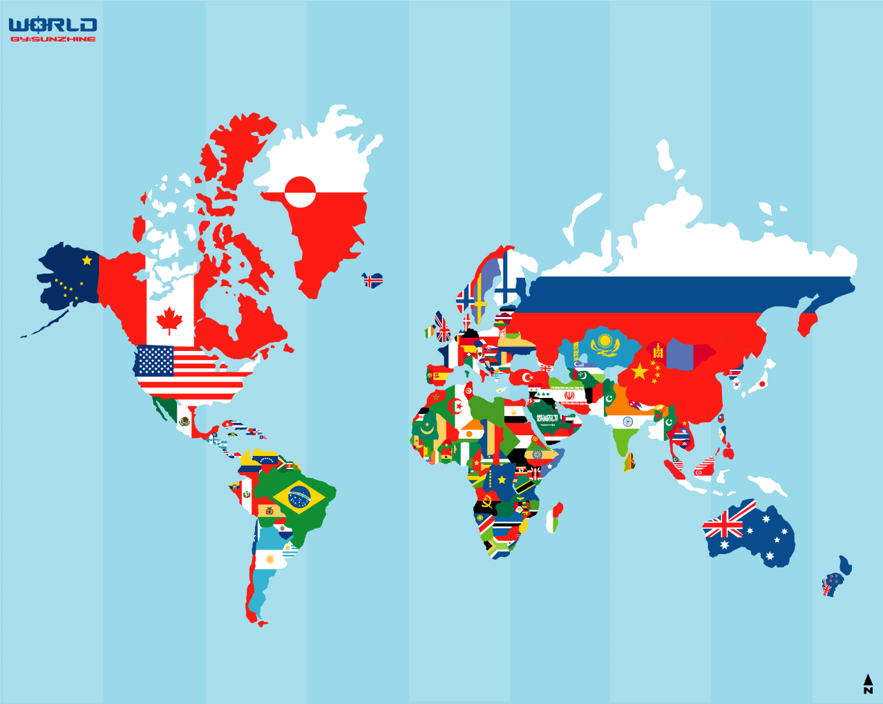 mapa de bandeiras wiki mayra